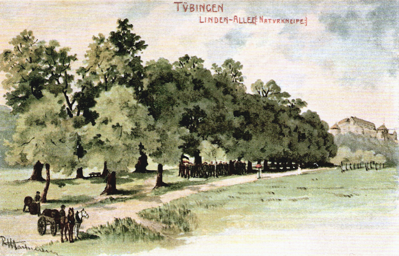 Lindenallee als Naturkneipe der Tübinger Königsgesellschaft Roigel. Postkarte mit der Reproduktion eines Gemäldes des Roigel-Mitglieds Reinhold Julius Hartmann.